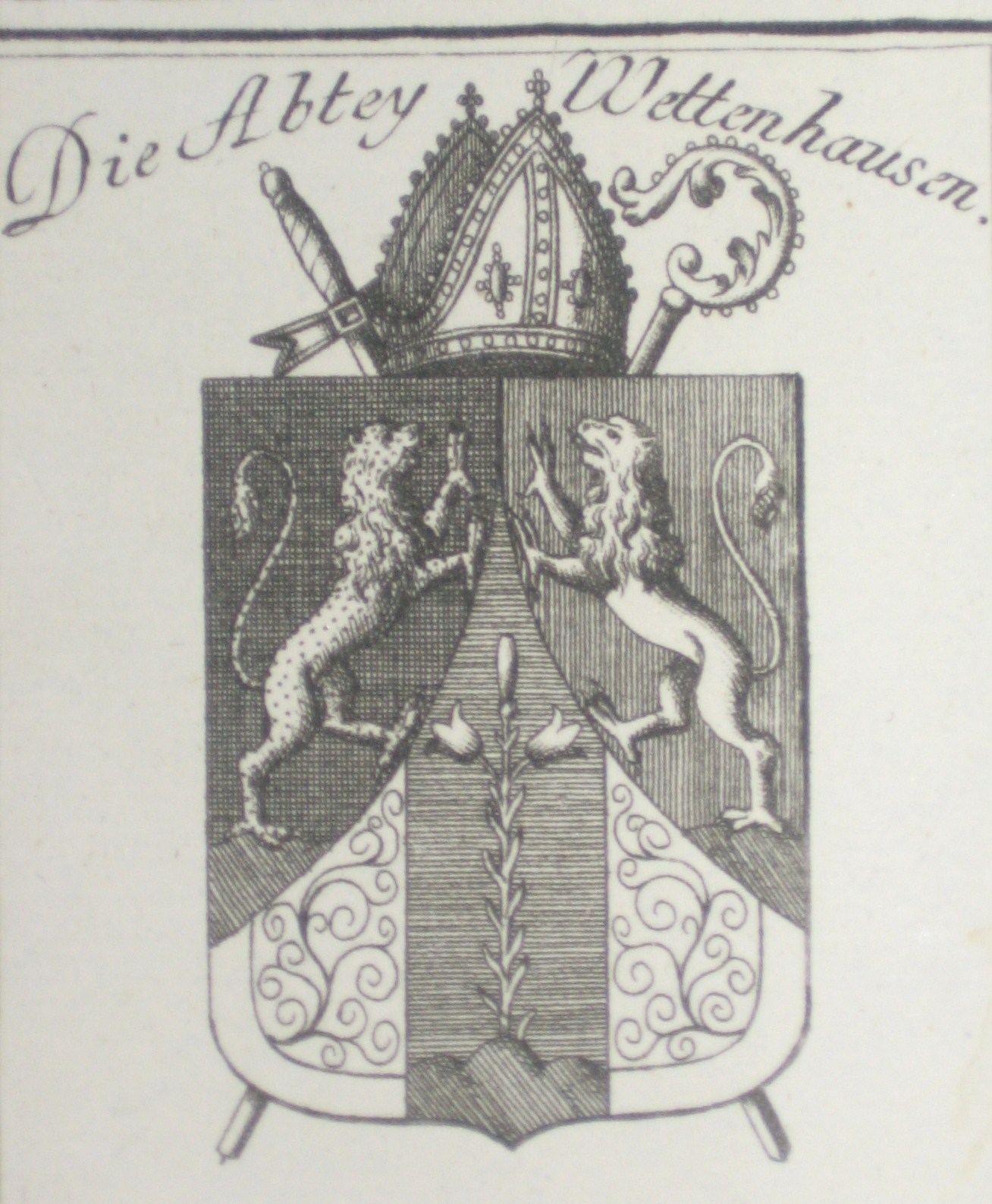 Kupferstich Abtei Wettenhausen